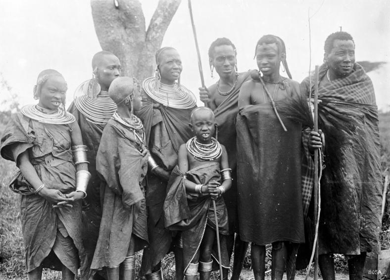 "Massaitypen; Männer, Frauen und Kinder"